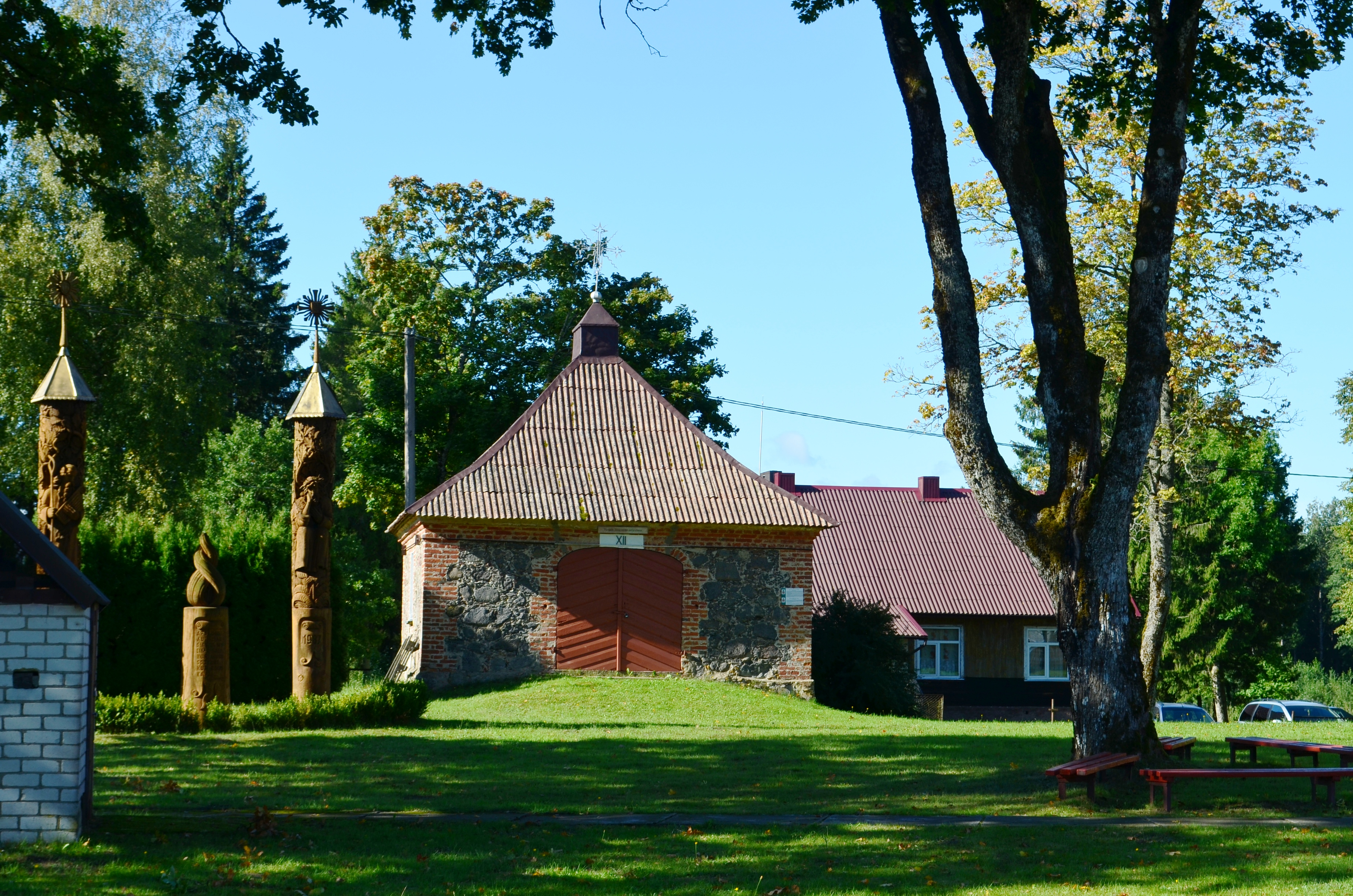 Žemaitėška: Vėina ėš Tūbėniu bažninčės stacėju, Šėlalės rajuons